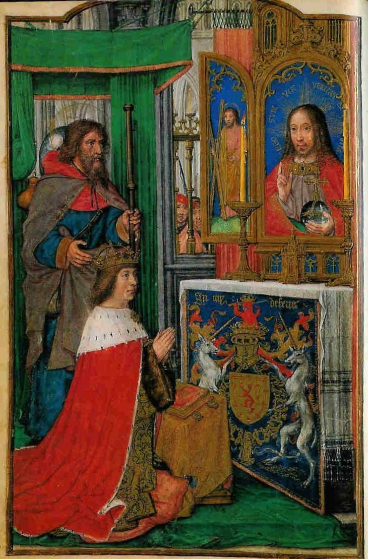 Portrait de Jacques IV, extrait du folio 24v.